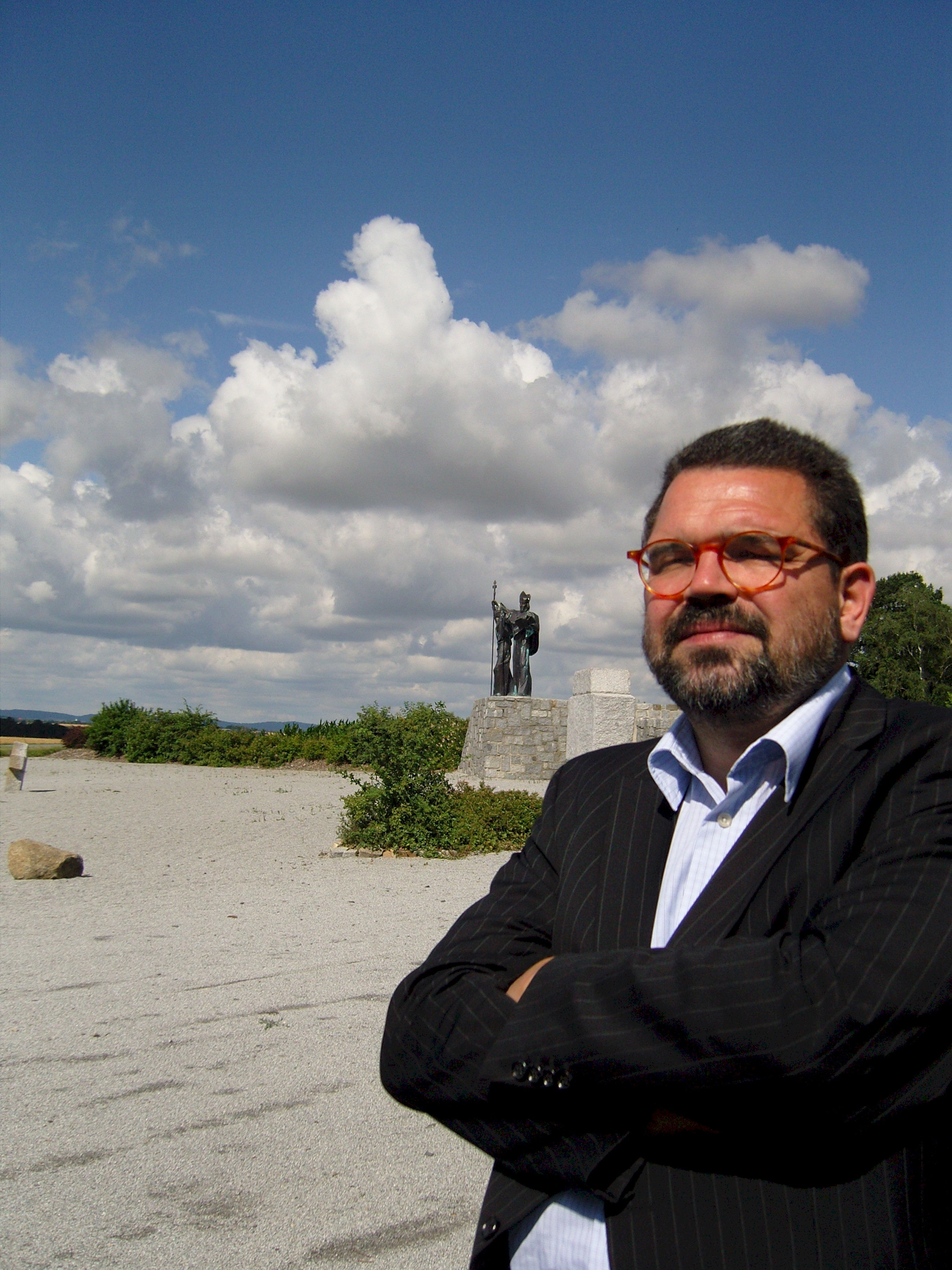 Im Hintergrund: Von Dobrosław Bagiński gestaltetes sorbisches Millenniumsdenkmal für die Slavenapostel Hll. Cyrill und Methodius in Schmochtitz bei Bautzen